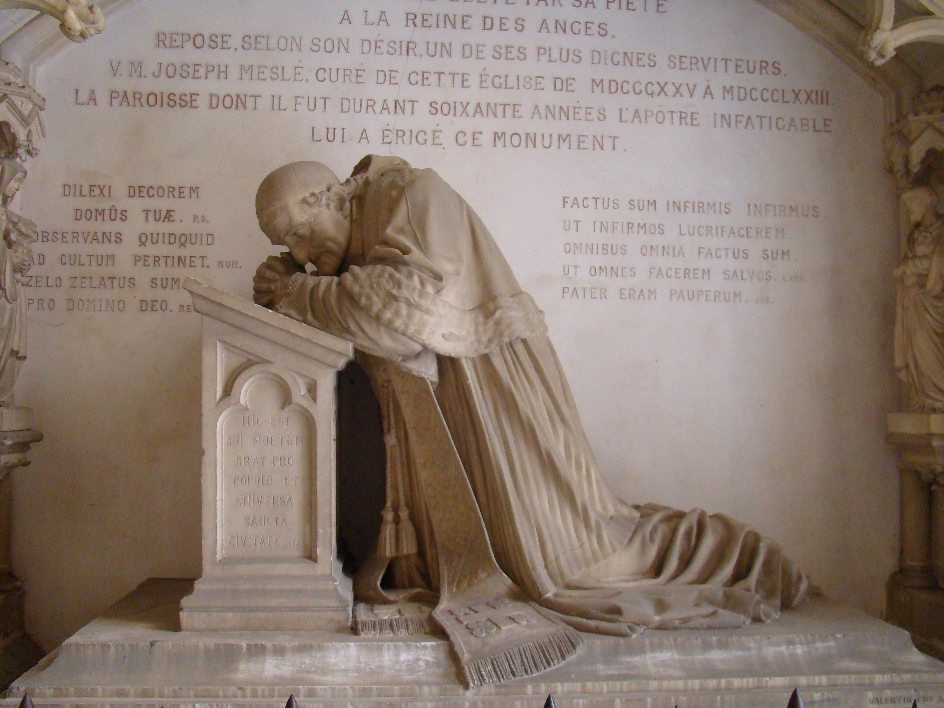 Monument de Mr Meslé